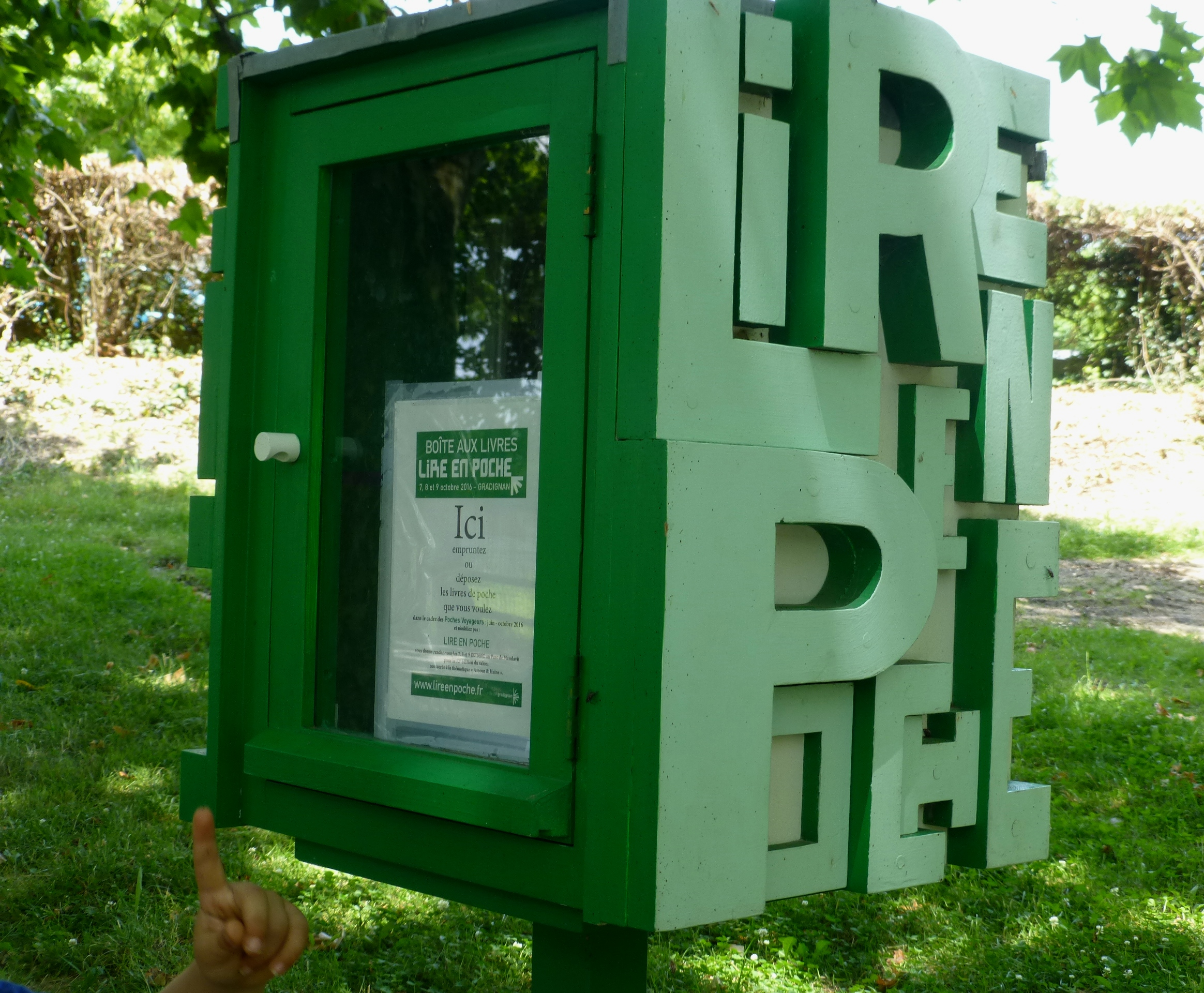 Gradignan, parc du Moulineau ː boite à livres dans le cadre du salon Lire en Poche.